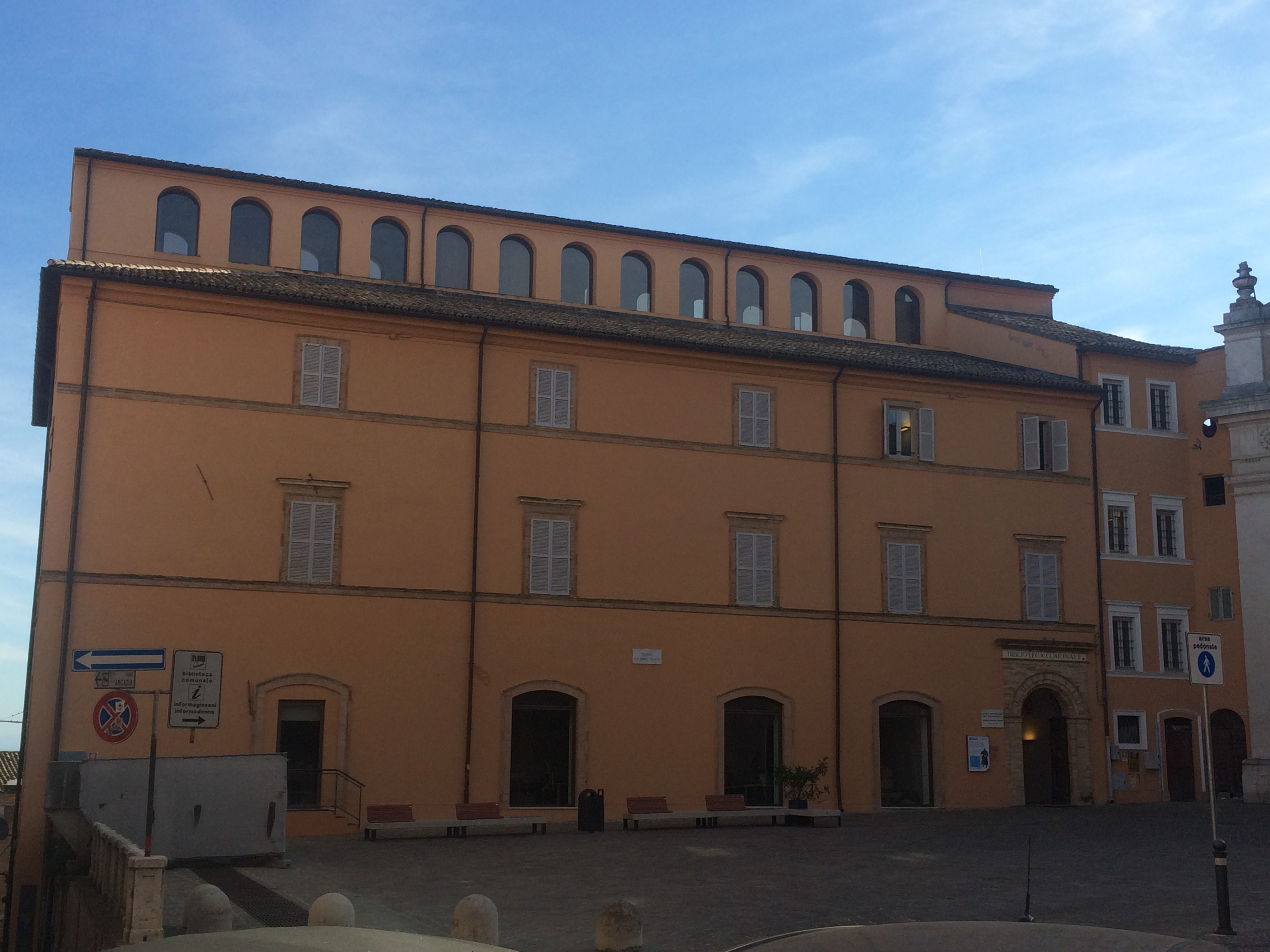 Biblioteca comunale Mozzi-Borgetti This is a photo of a monument which is part of cultural heritage of Italy.